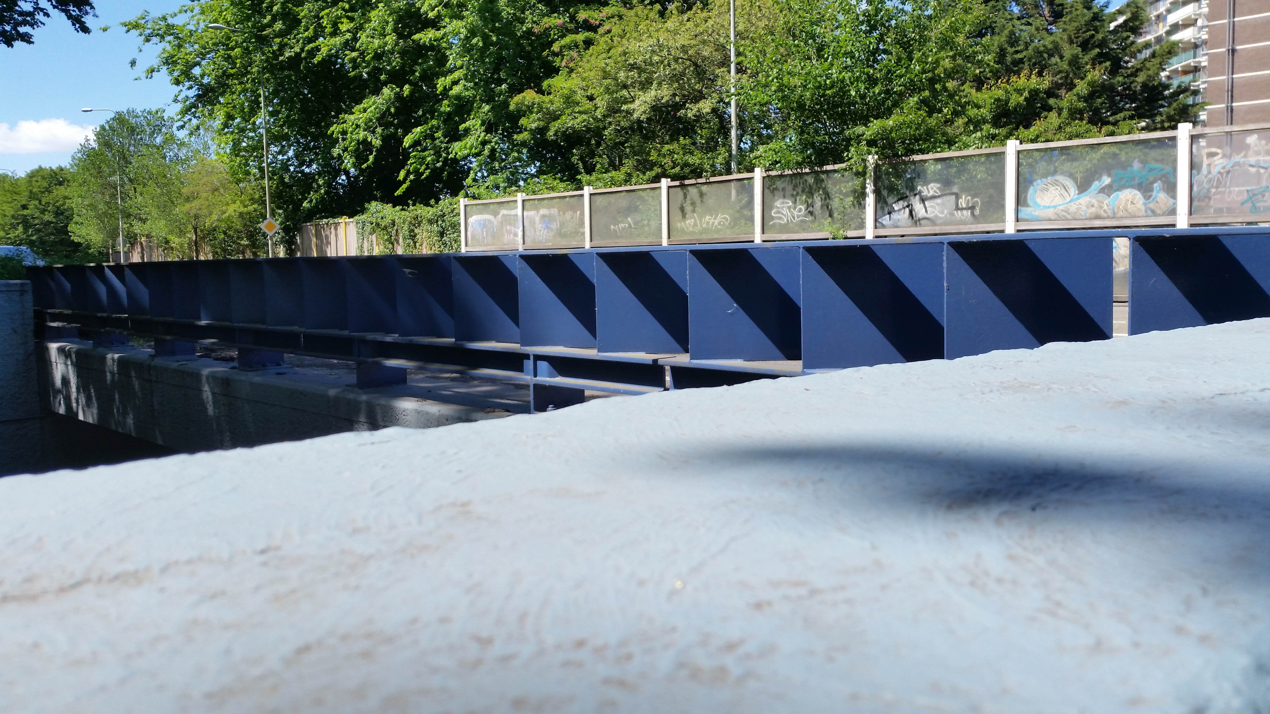 Impressie van Brug 957 (Het Breedbrug) in de Waddenweg, Amsterdam-Noord